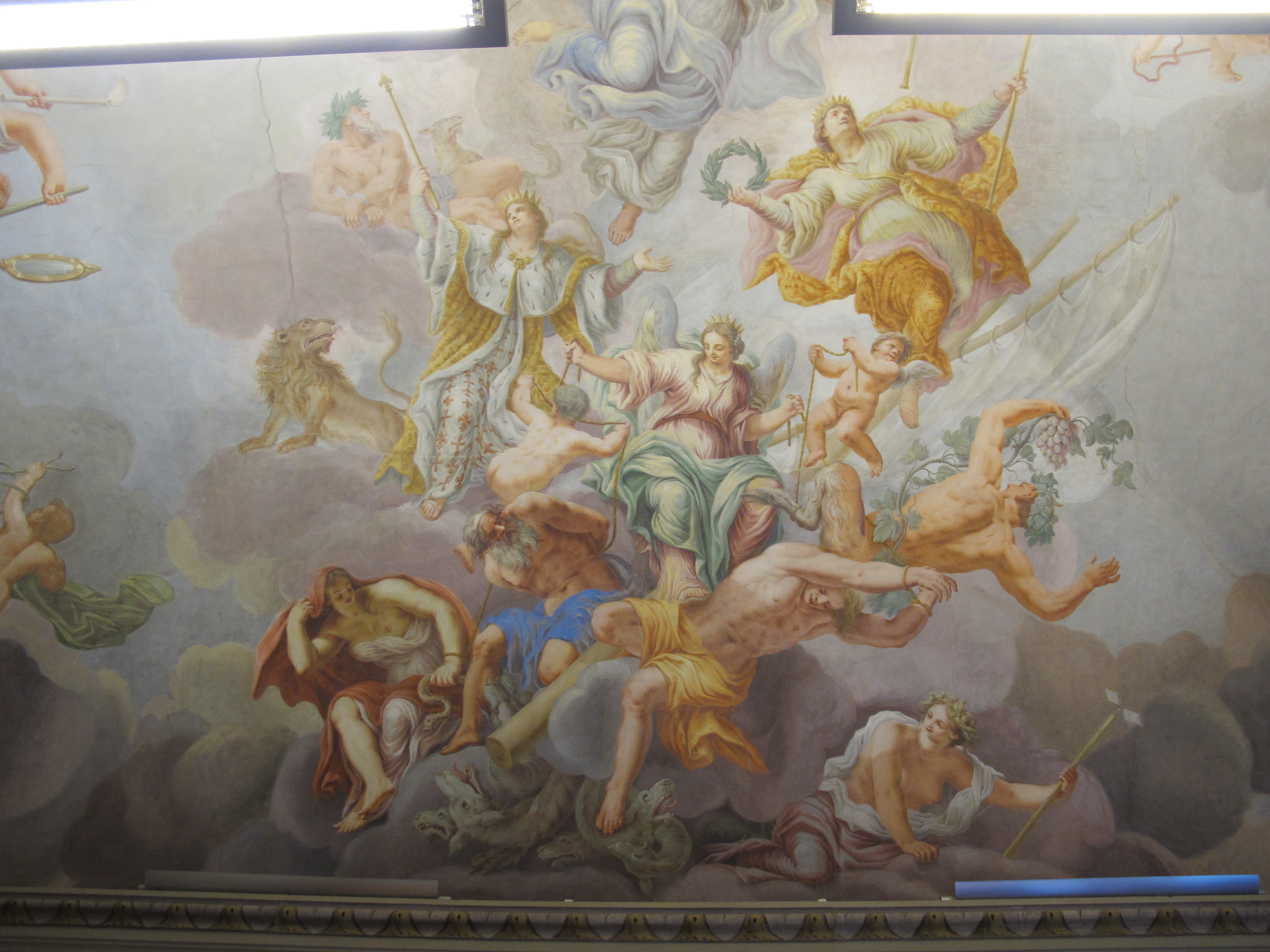 Palazzo Franceschi-Dragomanni, salone di Atanasio Bimbacci